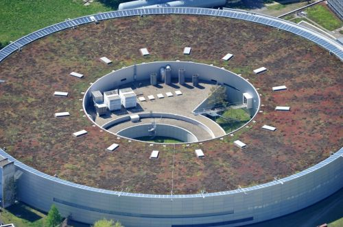 BERLIN 28.04.2012 Das Gelände des Elektronen- Speicherring BESSY der einzigen deutschen Synchrotronstrahlungsquelle der dritten Generation in Berlin-Adlershof. Die Berliner Elektronenspeicherring-Gesellschaft für Synchrotronstrahlung (BESSY) stellt diese Synchrotronstrahlung für die internationale Forschung und Industrie bereit. Das Helmholtz-Zentrum Berlin ( HZB ) ist aus der Fusion des ehemaligen Hahn-Meitner-Instituts Berlin ( HMI ) und der Berliner Elektronenspeicherring-Gesellschaft für Synchrotronstrahlung (BESSY) hervorgegangen. Als Mitglied der Helmholtz-Gemeinschaft wird das HZB zu 90 Prozent vom Bund und zu 10 Prozent vom Land Berlin gefördert. // View onto the electron storage ring BESSY in Berlin - Adlershof. /